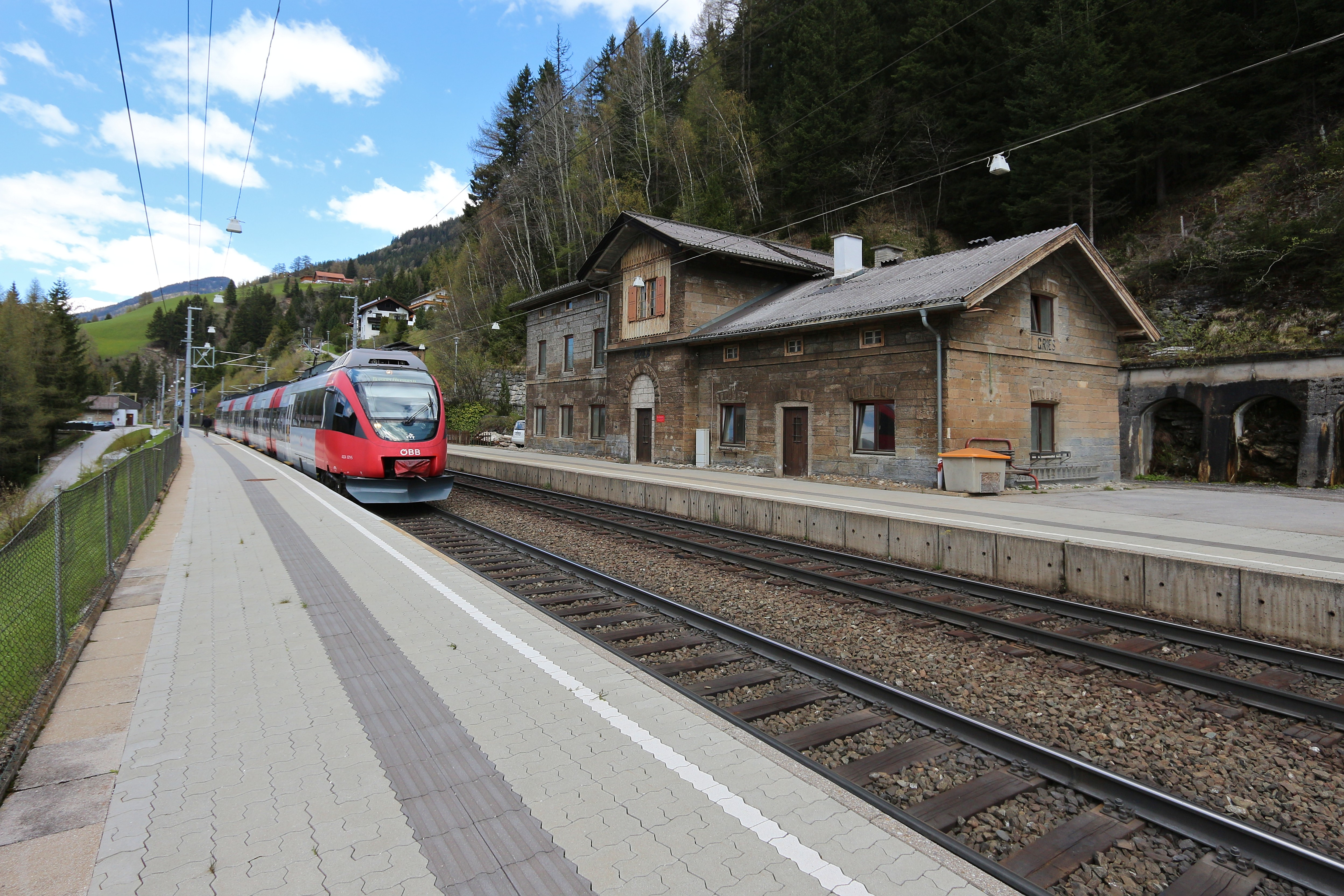 Bahnhof Gries am Brenner mit S-Bahn-Garnitur nach Brennero/Brenner